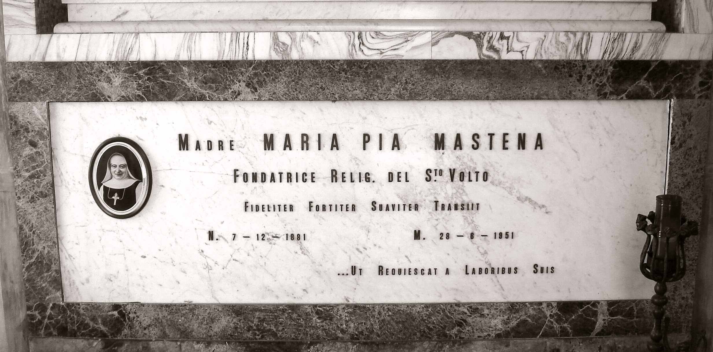 San Fior (Treviso, Italia): tomba della beata Maria Pia Mastena, luogo di devozione nella cappella della Congregazione religiosa delle suore del Santo Volto nel cimitero paesano.